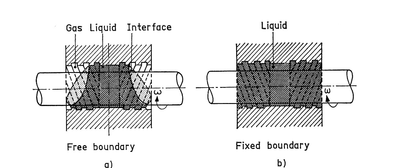 Eigen werk, zie J.Bootsma Liquid-lubricated-spiralgroefbearings, blz. 6